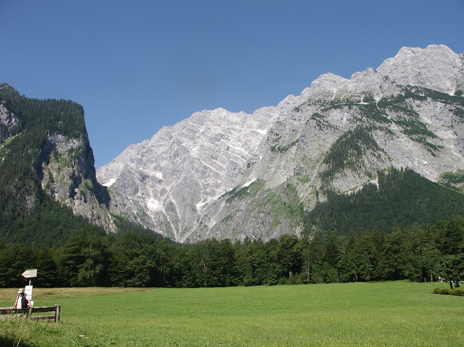 Watzmann - Ostwand